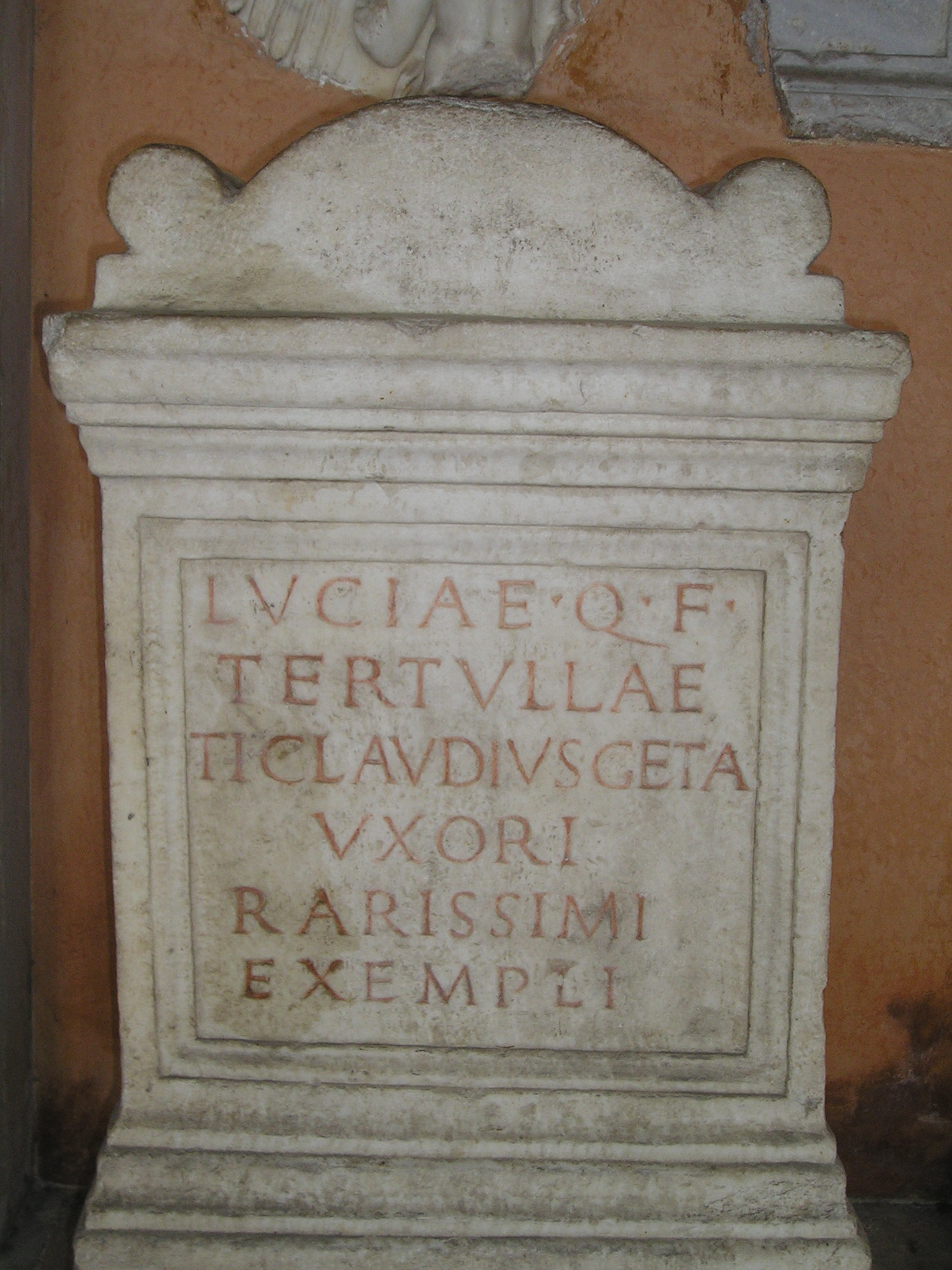 Ara funeraria romana depositada en el claustro de la Basílica de San pablo de Extramuros en roma, correspondiente a la inscripción CIL VI 21618, cuyo texto dice: LVCIAE Q(uinti) F(iliae)/ TERTVLLAE/ TI(berius) CLAVDIVS GETA/ VXORI/ RARISSIMI/ EXEMPLI